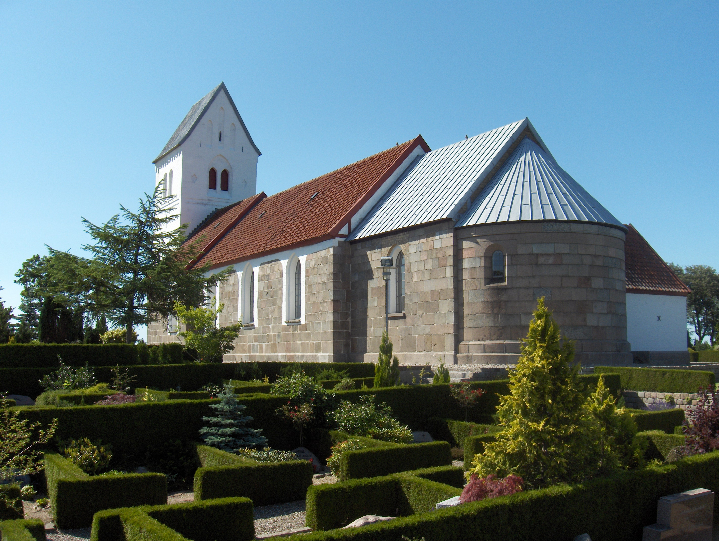 Nørre Tranders Kirke i Aalborg